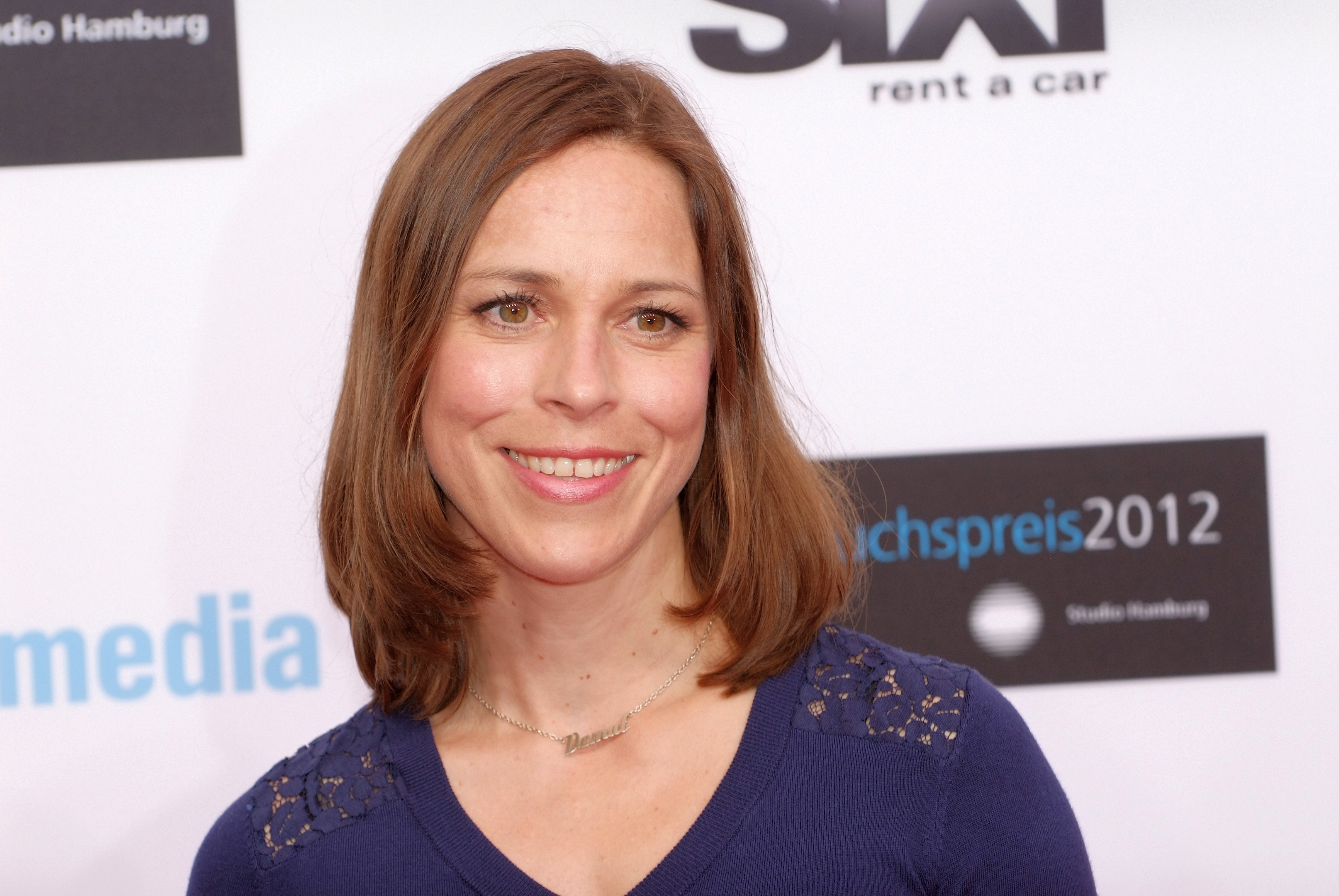 Studio Hamburg Nachwuchspreis 2012 Anneke Kim Sarnau